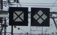 最長編成停車位置又は通過ポイント